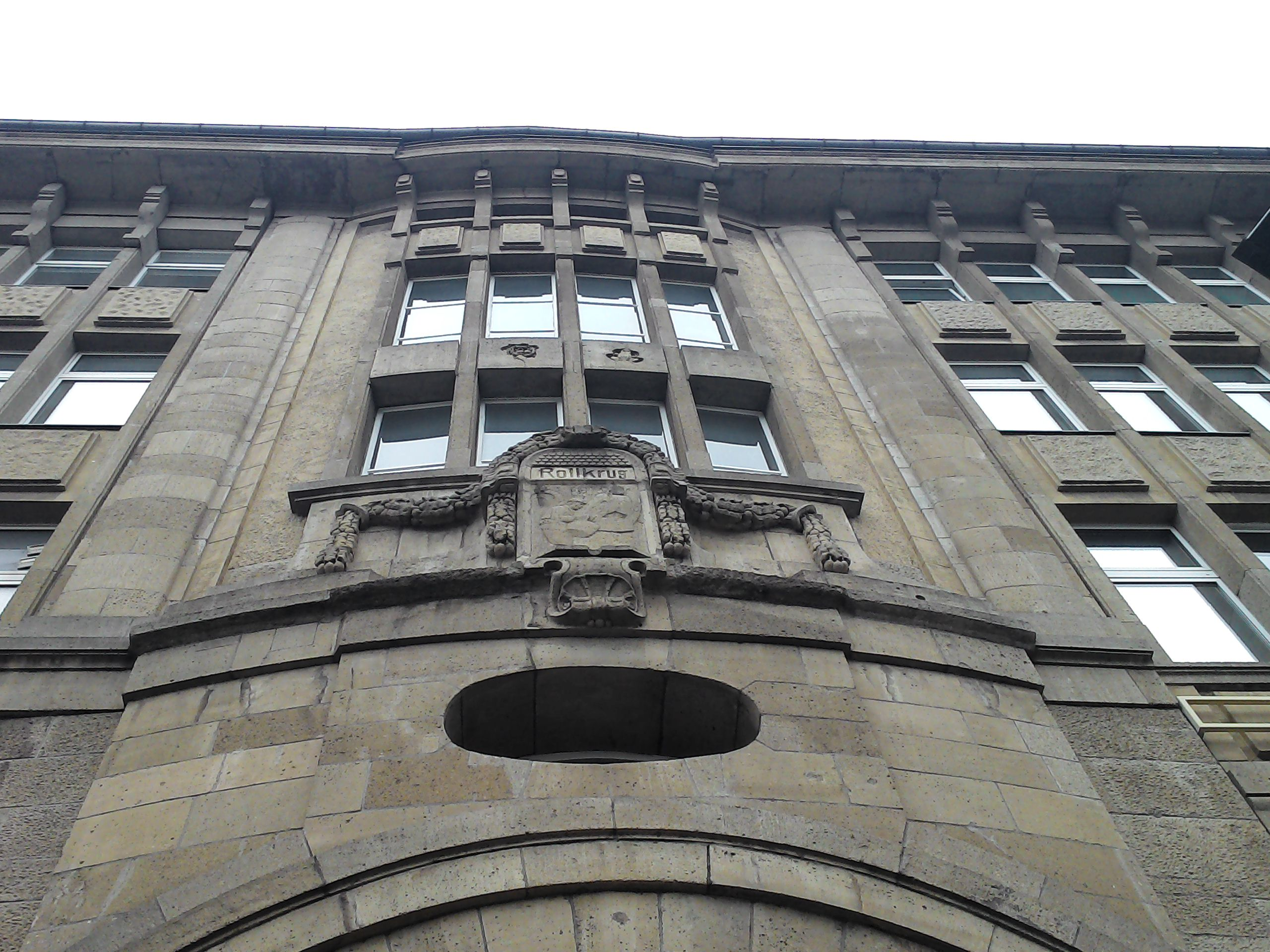 Berlin Hermannplatz: Das Büro- und Geschäftshaus steht an der Stelle der ehemaligen Gaststätte „Rollkrug“ in Berlin-Neukölln und trägt über dem Portal in der Hermannstraße den Aufschrift „Rollkrug“. Der 1988 unter Denkmalschutz gestellte Neubau soll auch „Neuer Rollkrug“ genannt werden.